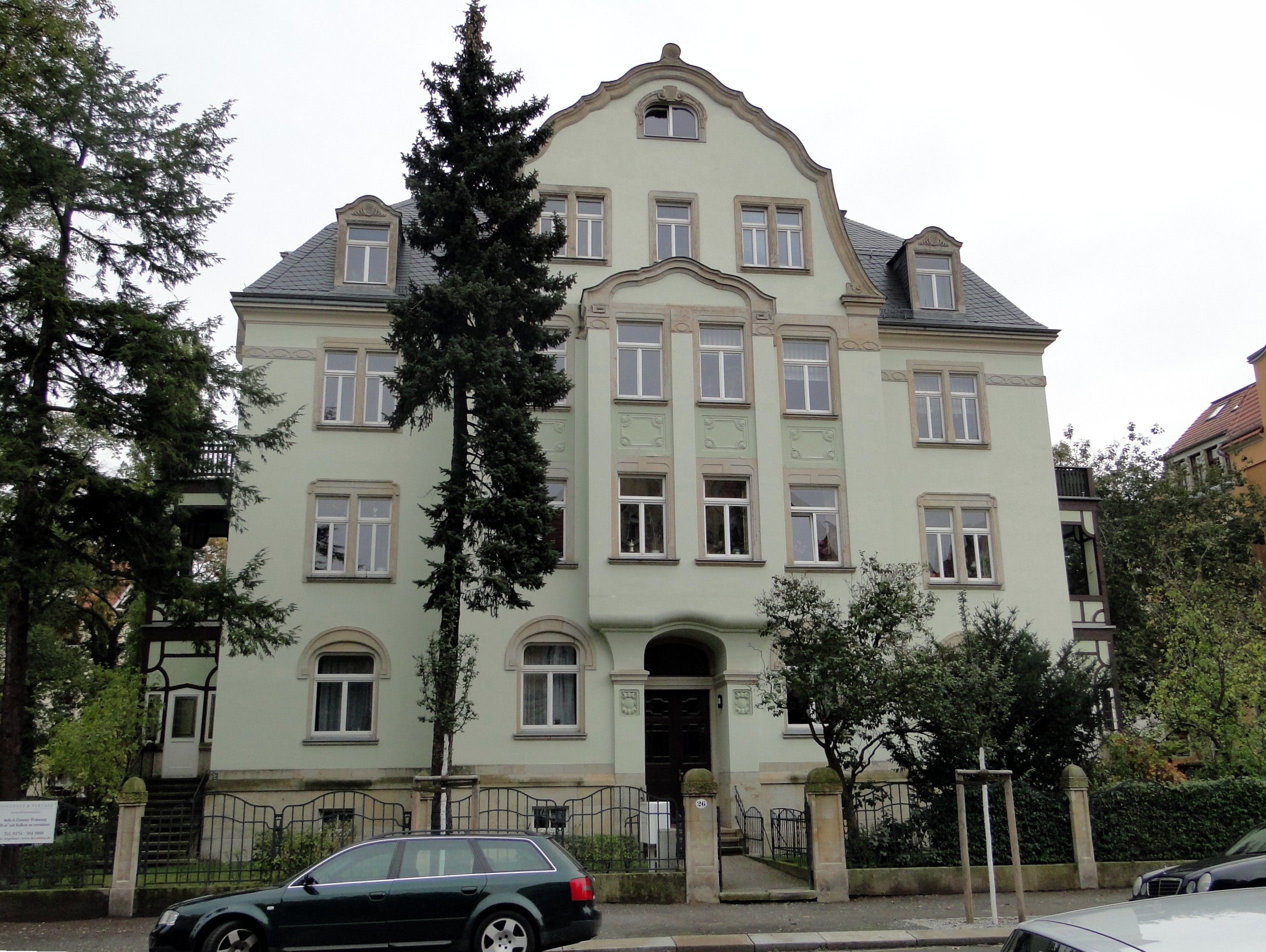 Jugendstilbau in Dresden